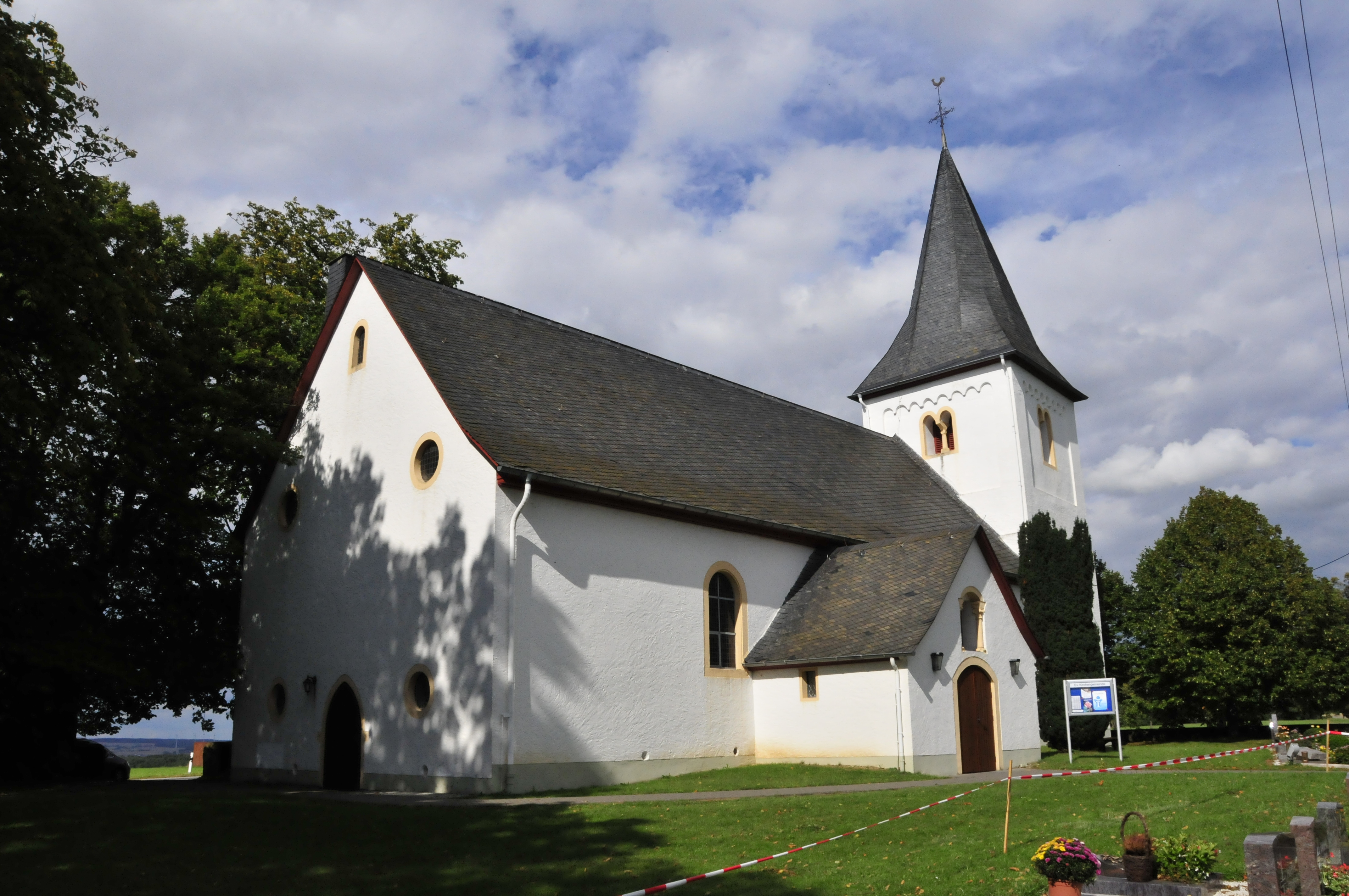 Nunkirche